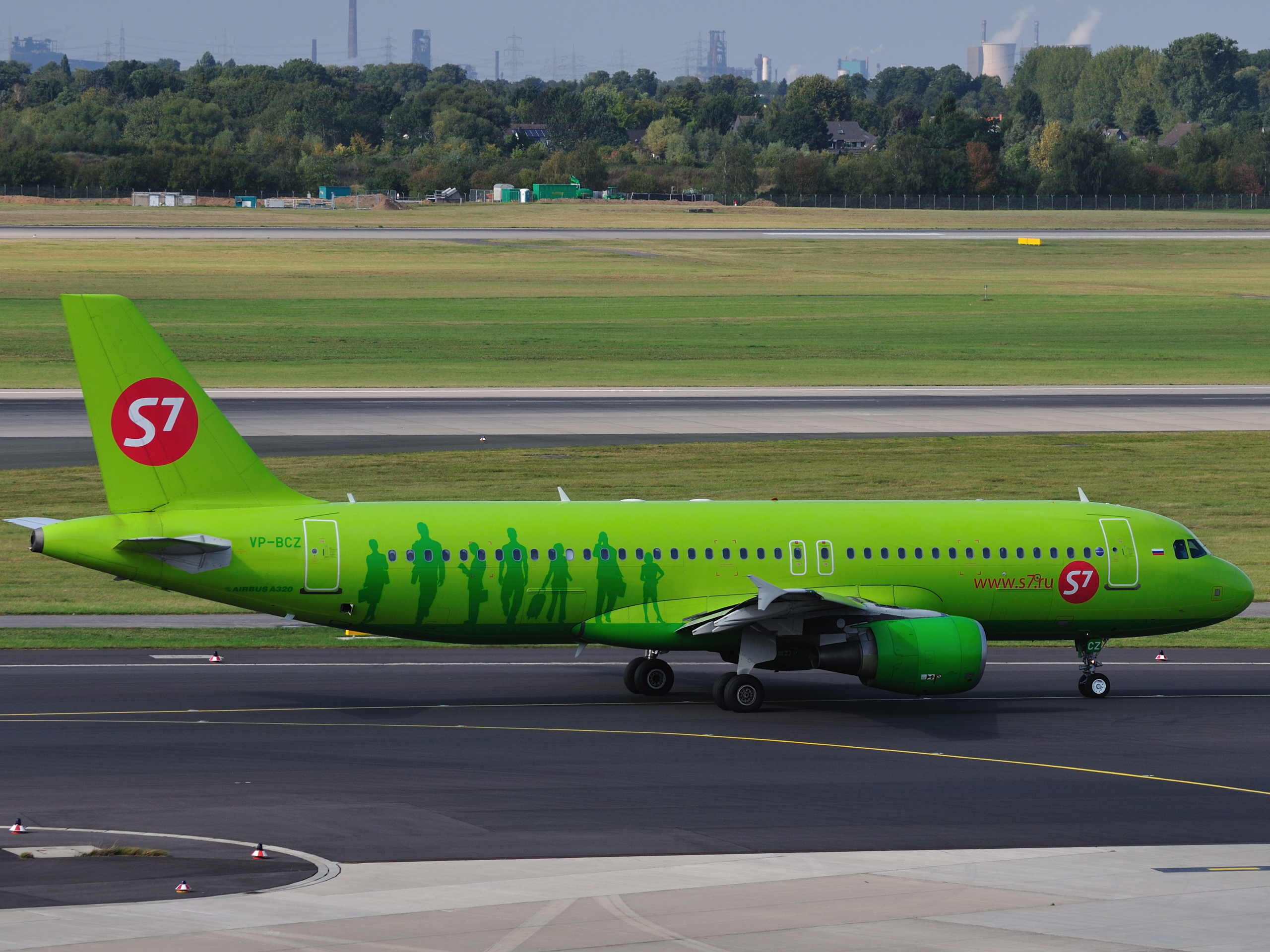 S7 Siberia Airlines A320-214 VP-BCZ